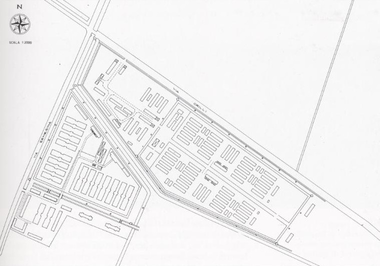 Pianta del Campo di Fossoli